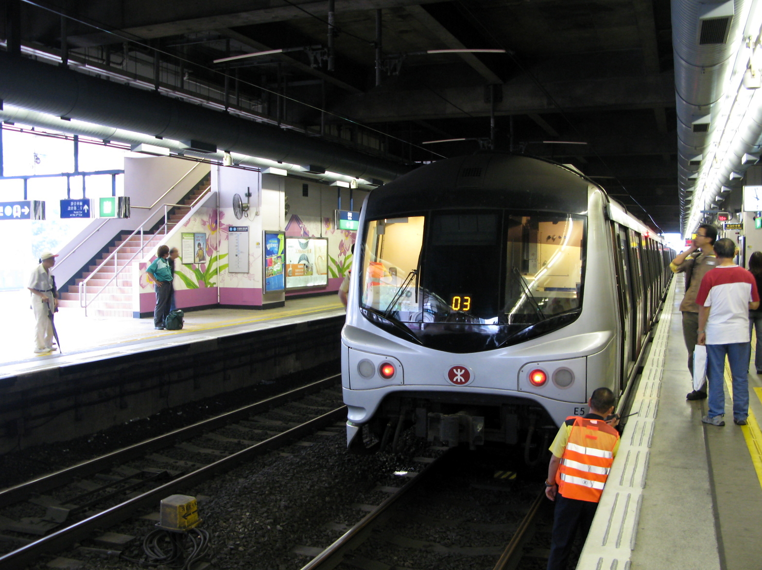 2009年10月22日沙田站墮軌意外